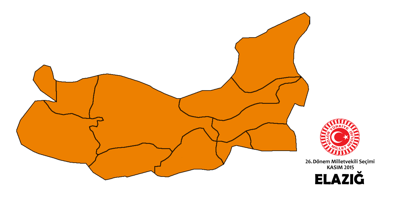 Kasım 2015 seçimleri